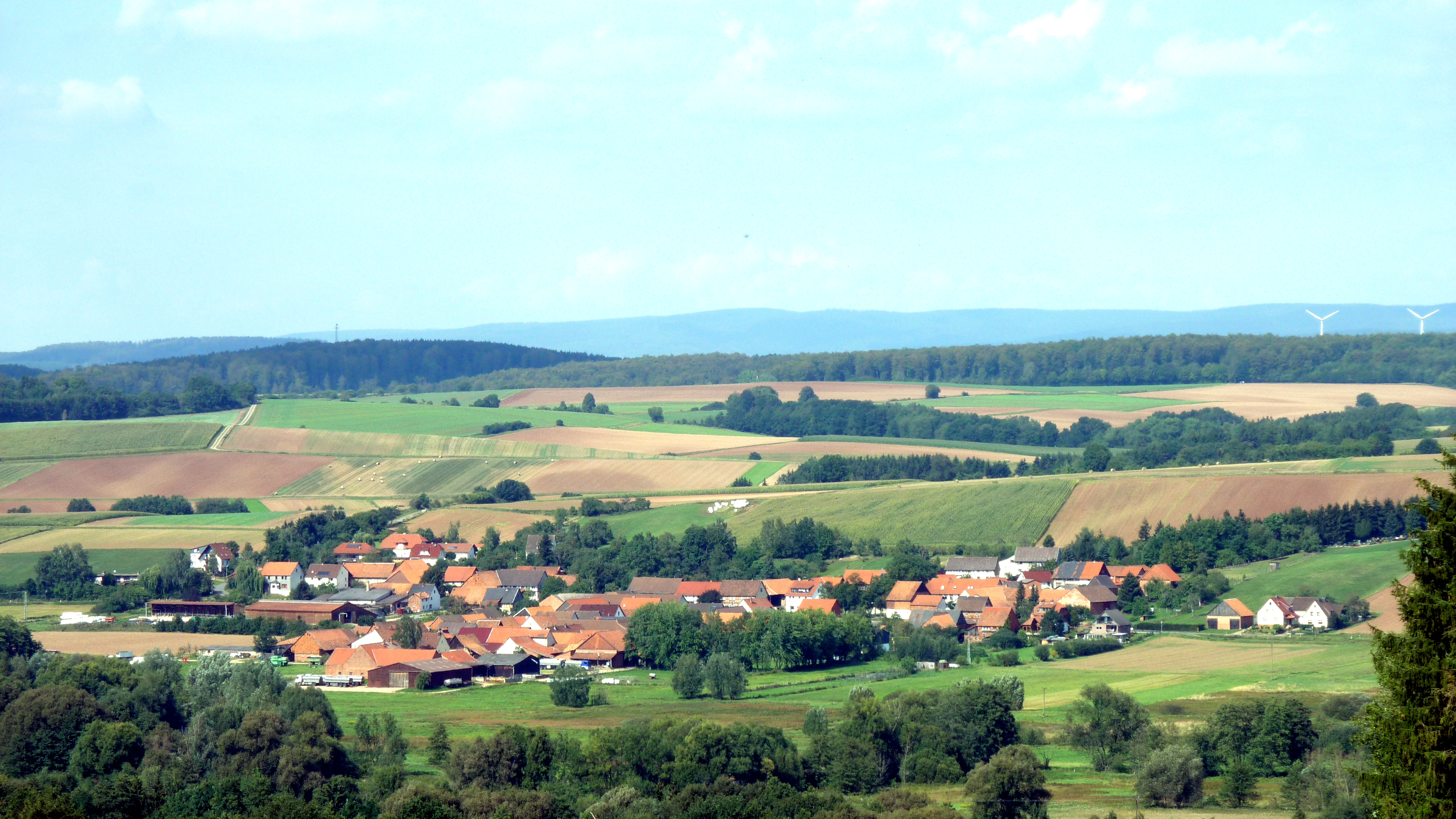 Blick vom Nordhang des Waakebergs Richtung Norden auf Lütgenhausen, Gemeinde Rhumspringe, Niedersachsen (im Hintergrund der Harz)